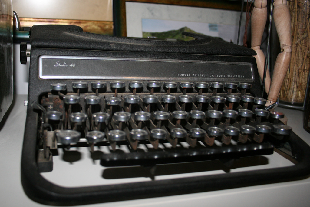 Olivetti Studio 46 - Hispanic model